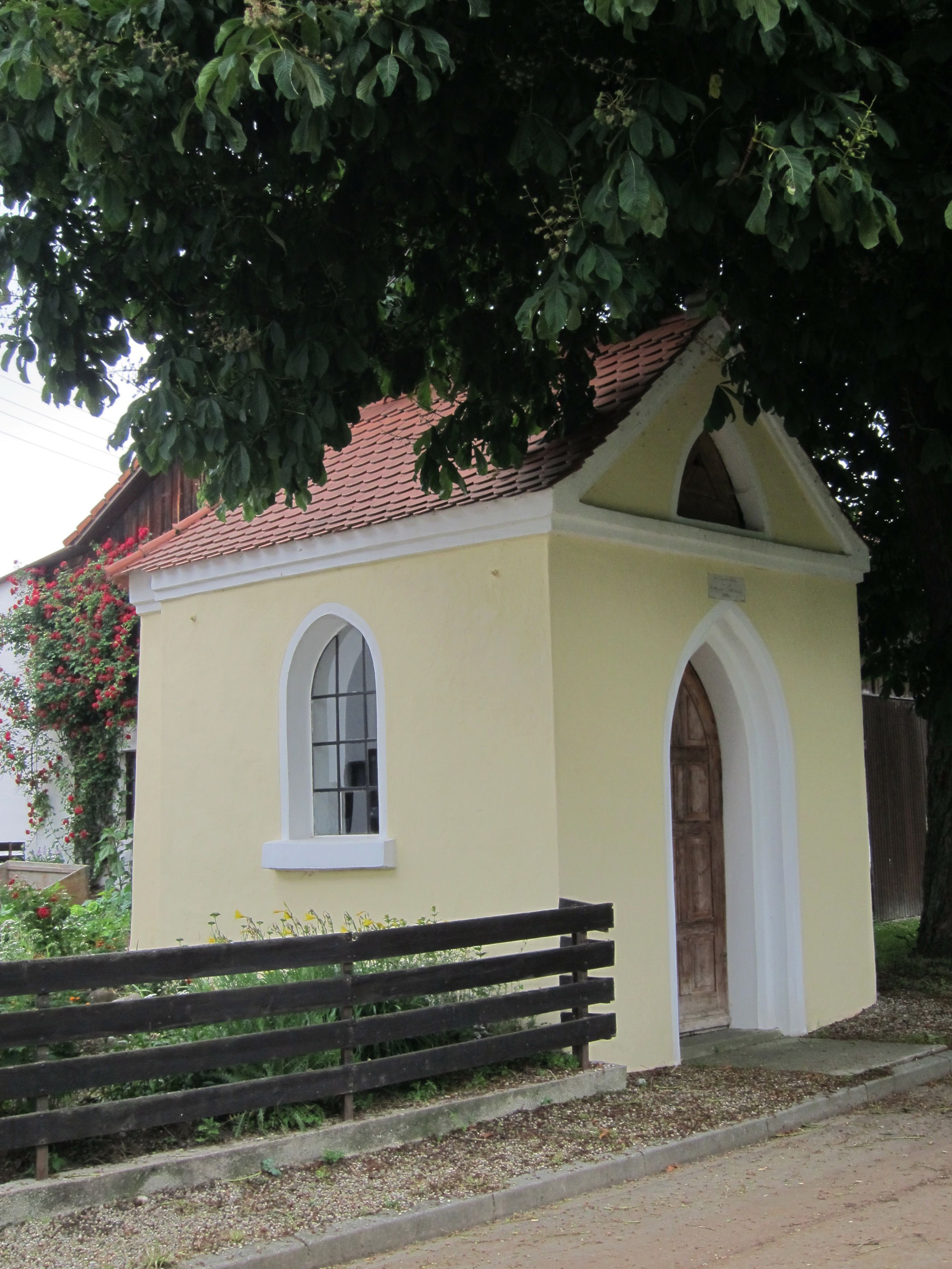 Itzling; Hofkapelle, kleiner massiver Bau in neugotischen Formen, bez. 1898; mit Ausstattung.